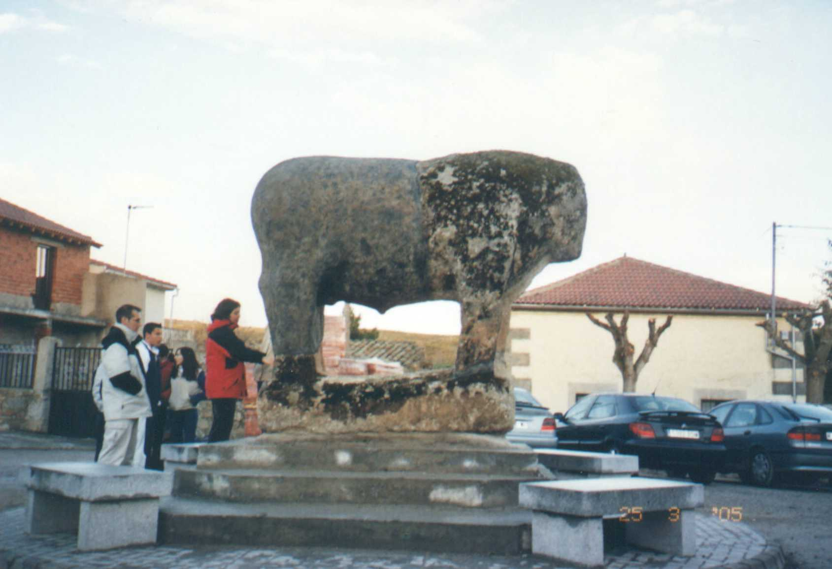 LA MAYOR ESCULTURA ZOOMORFA DE ORIGEN VETÓN ENCONTRADA HASTA EL MOMENTO EN ESPAÑA. PLAZA MAYOR DE VILLANUEVA DEL CAMPILLO (AVILA, ESPAÑA)